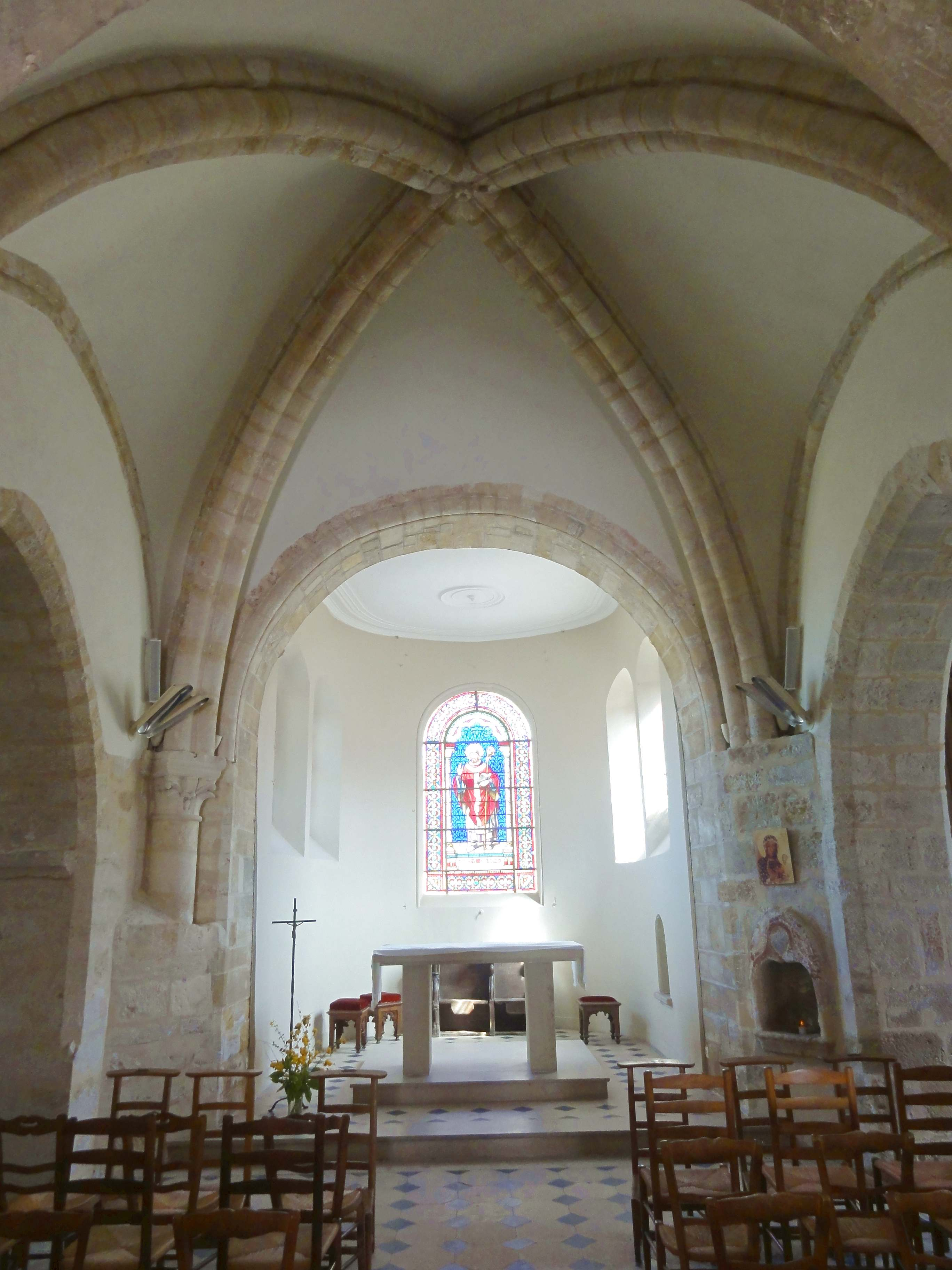 Intérieur de l'église - voir titre.